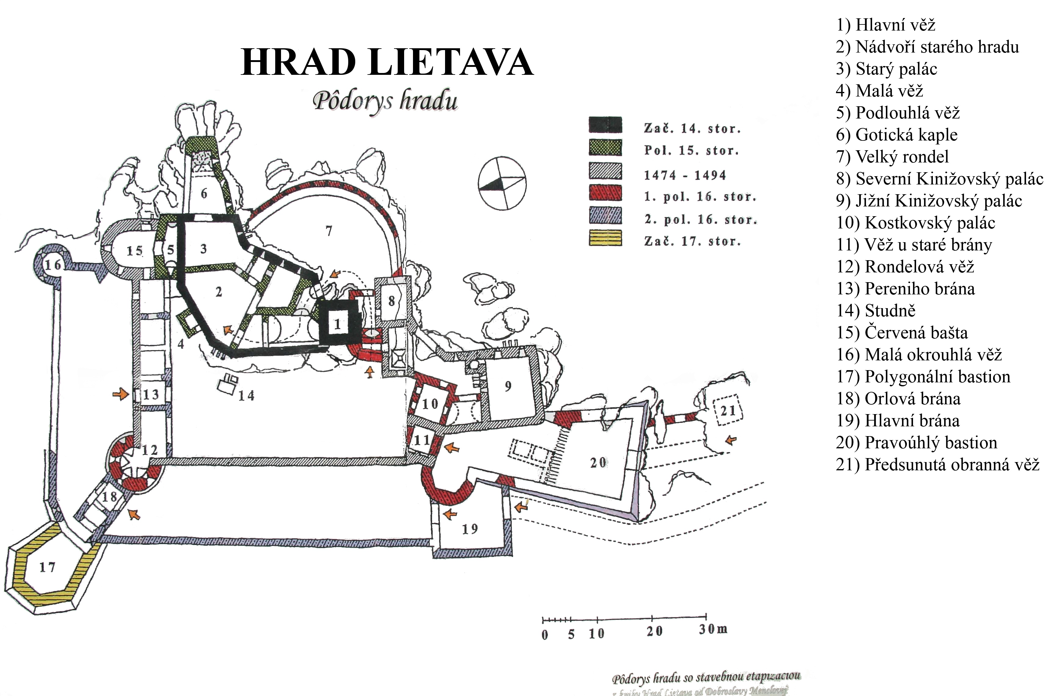 Castle Lietava